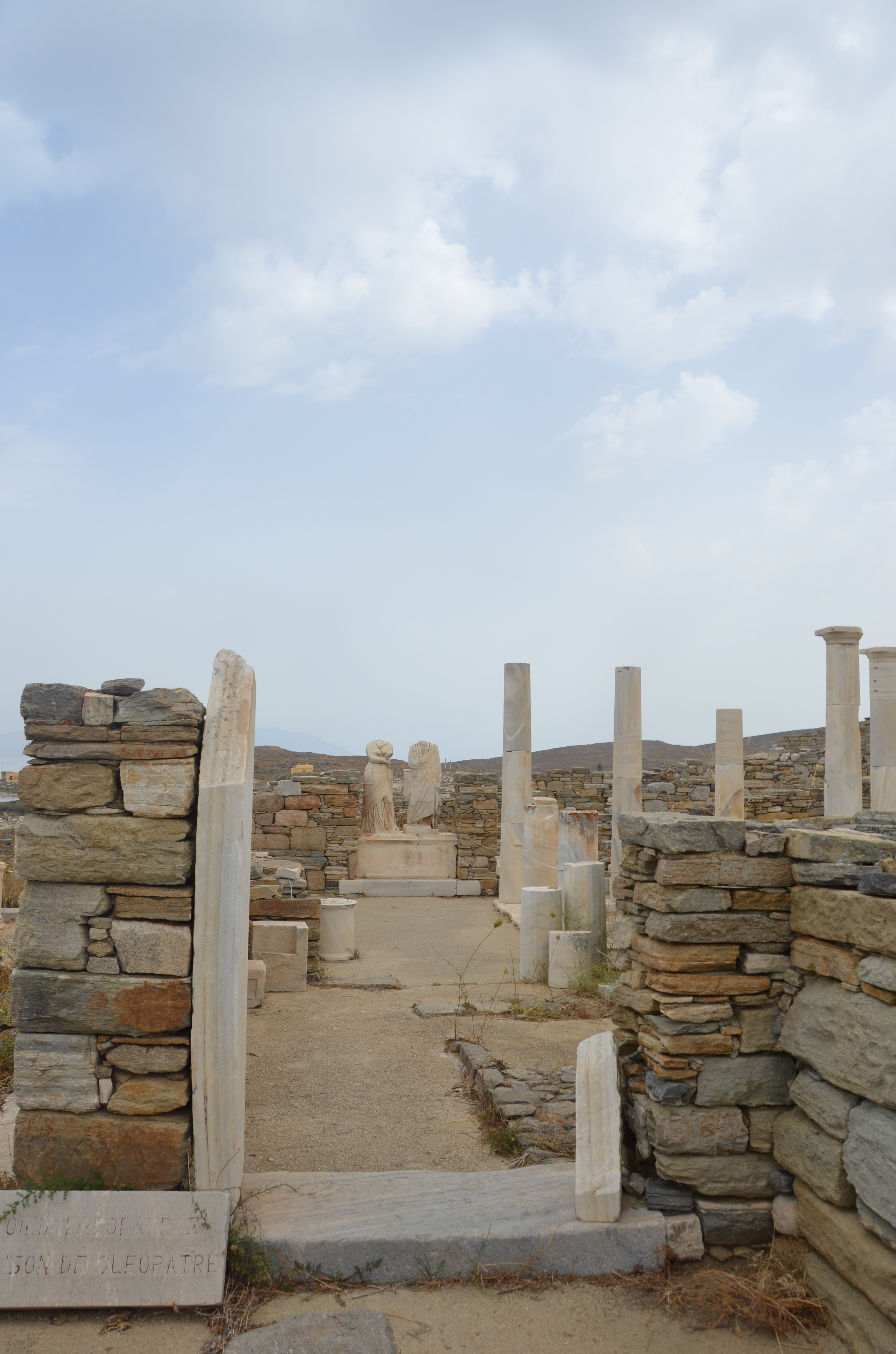 Haus des Dioskurides und der Kleopatra auf der griechischen Insel Delos